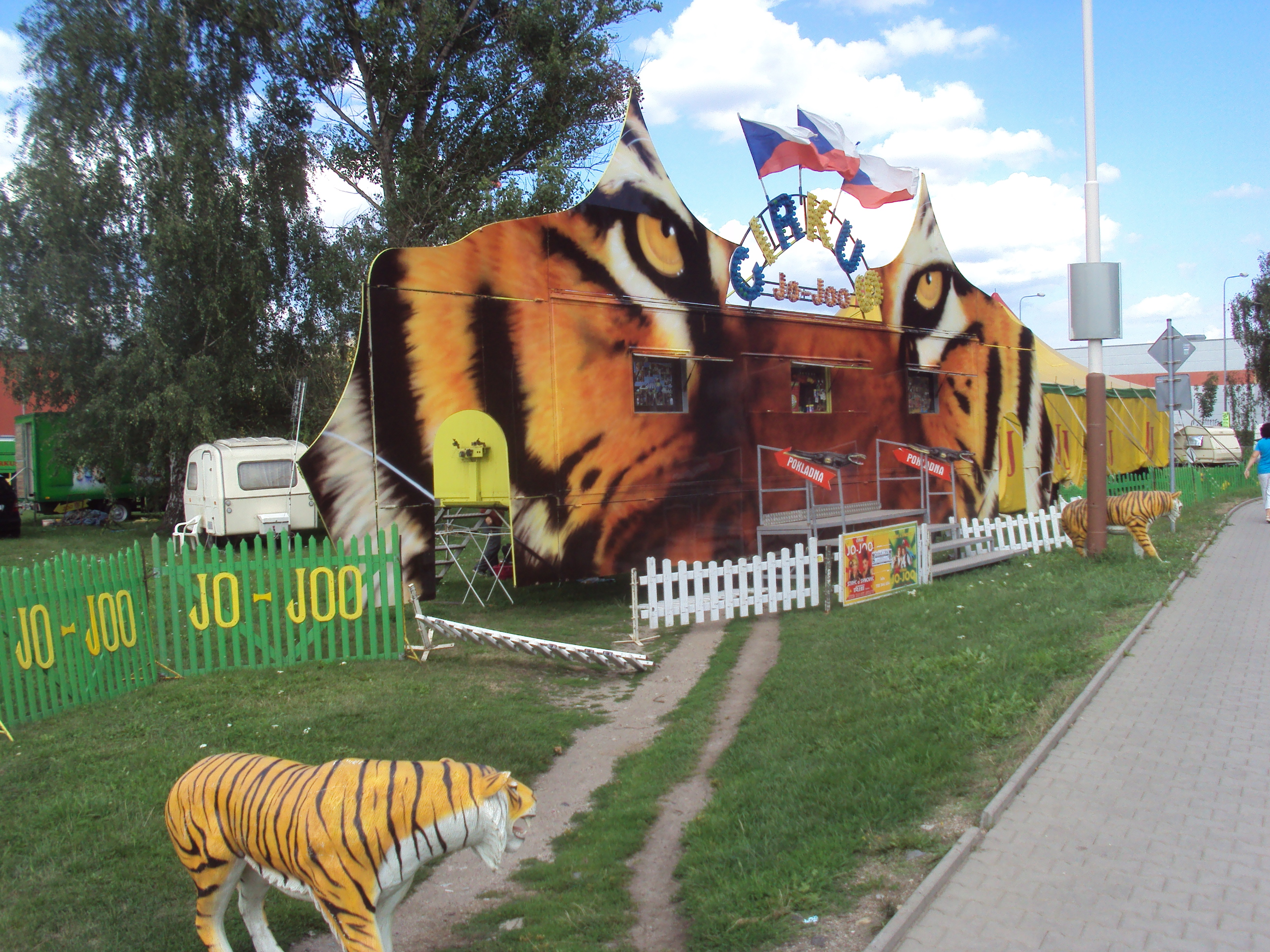 Cirkus v České Lípě